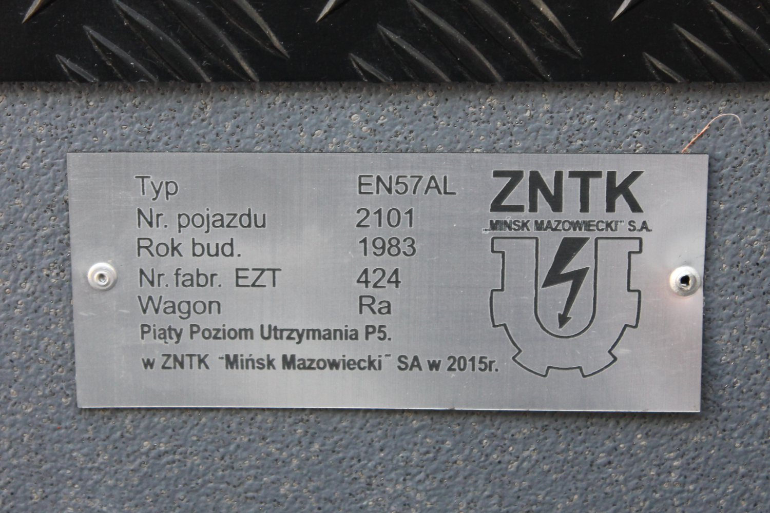 Tabliczka znamionowa zmodernizowanego elektrycznego zespołu trakcyjnego EN57AL-2101 podczas targów Trako 2015. The making of this document was supported by Wikimedia Polska Association, within Wikigrant no. WG 2015-34. English | polski | +/−